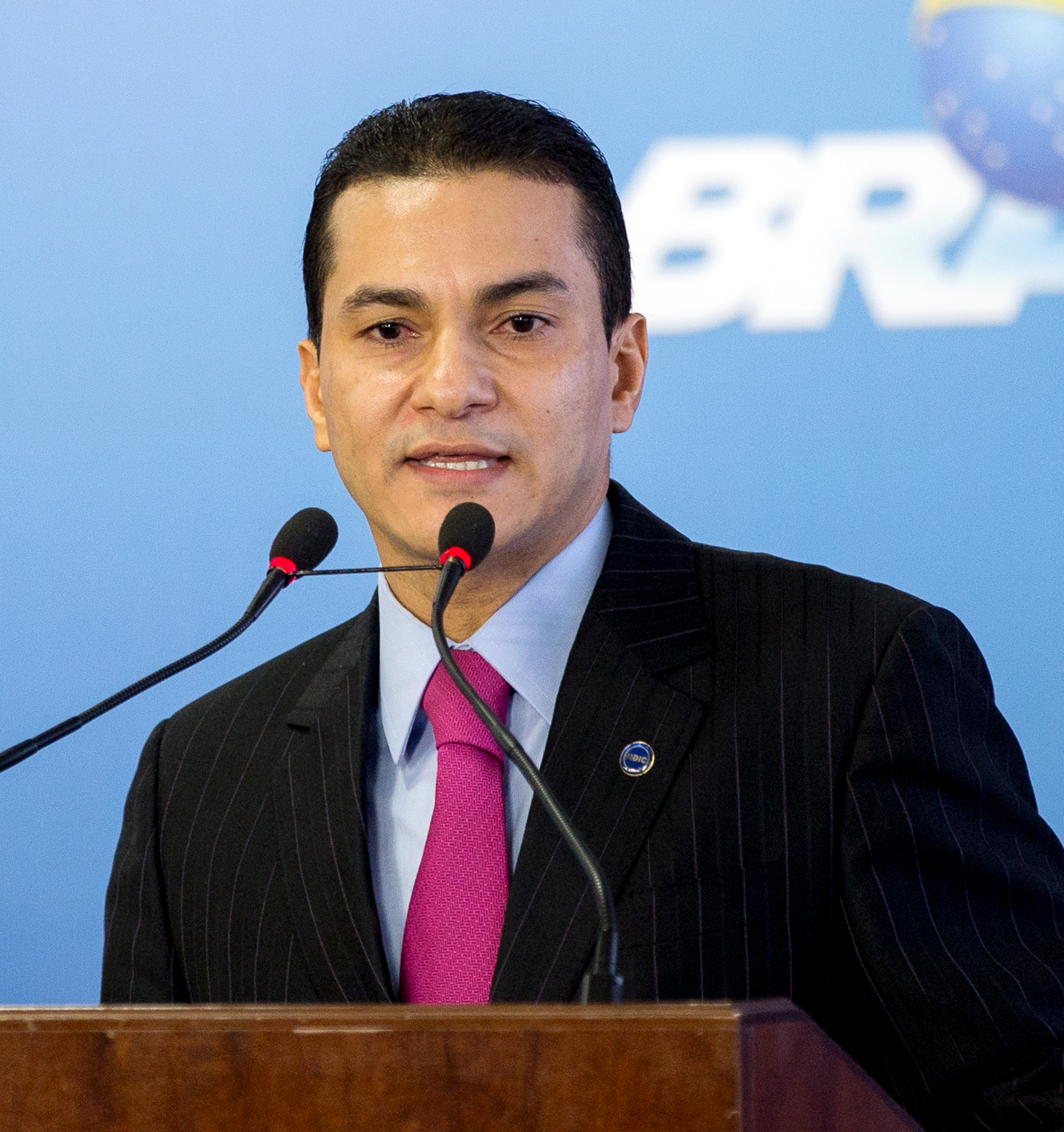 Marcos Pereira, ministro da Indústria, Comércio Exterior e Serviços e presidente nacional do PRB